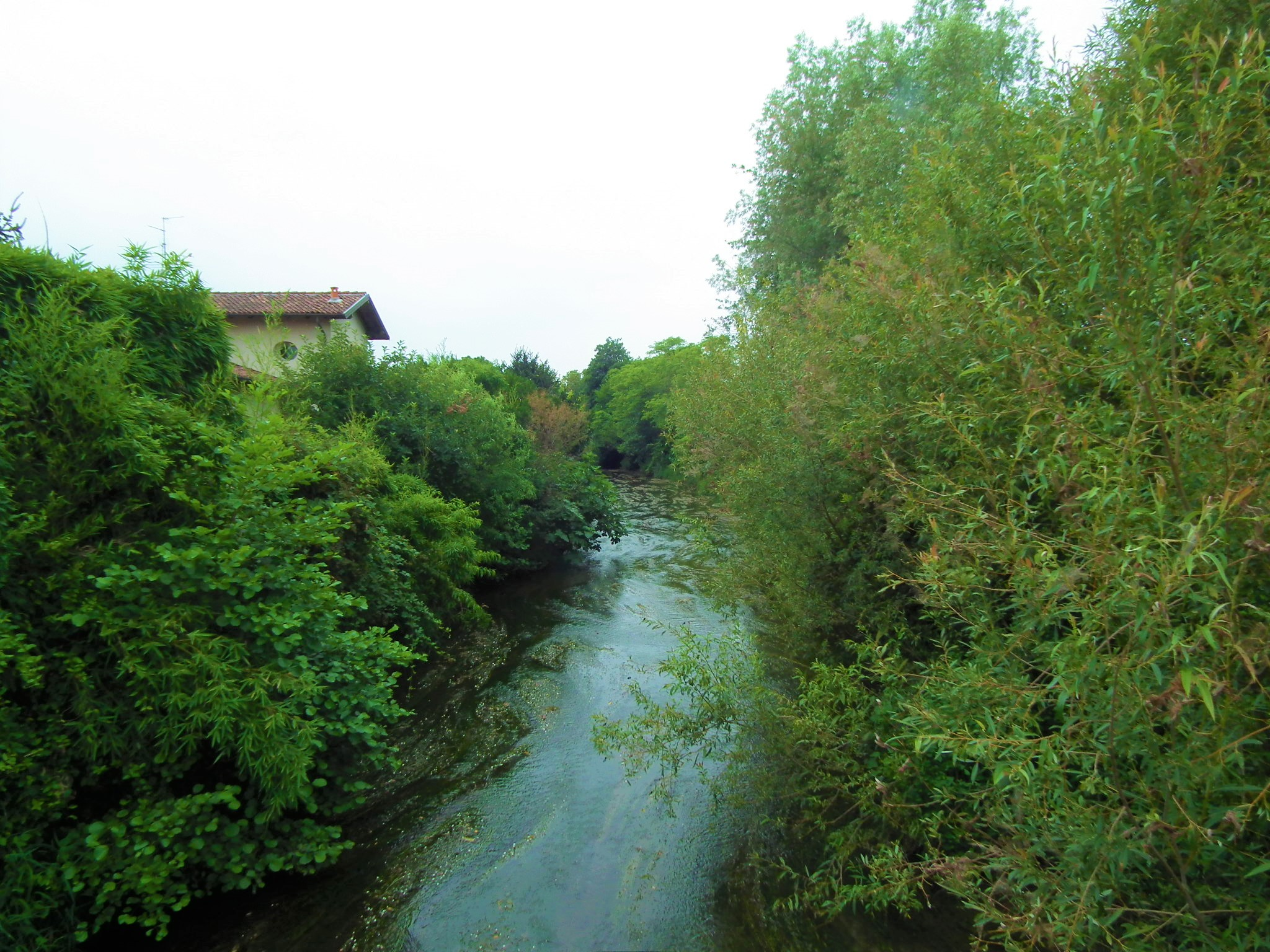 Roggia Busca vista dalla strada provinciale SP14 nei pressi dell'abitato di Mandello Vitta (direzione nord).